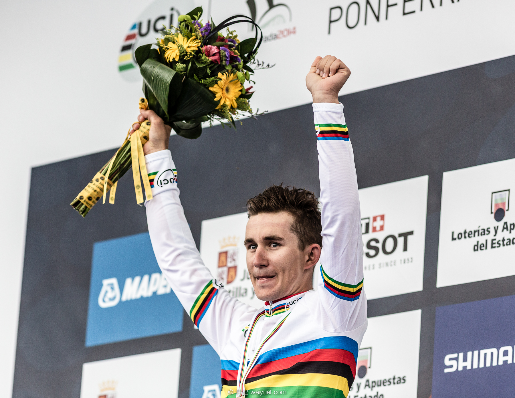 RR Men's Elite